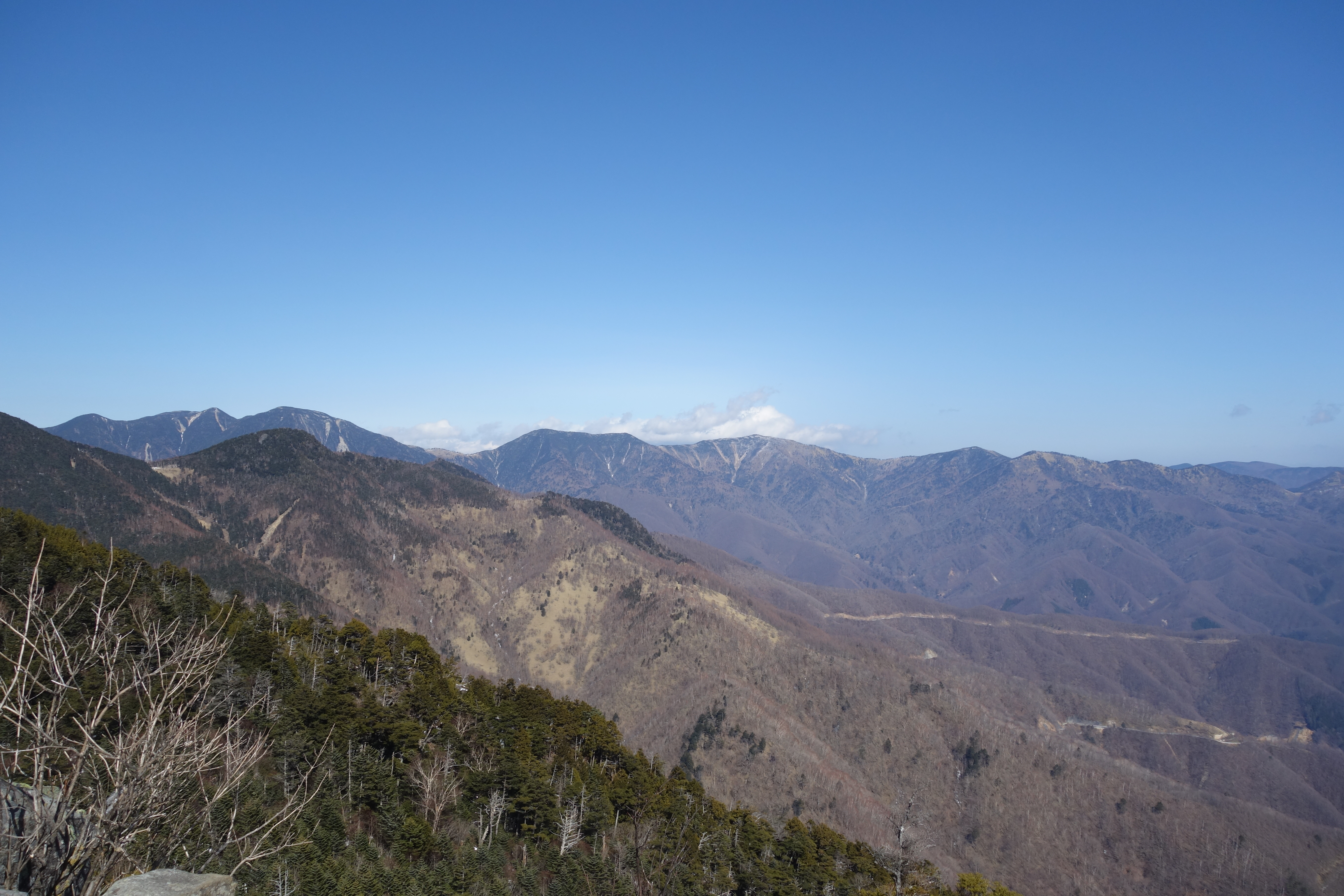 乾徳山から見た奥秩父山塊